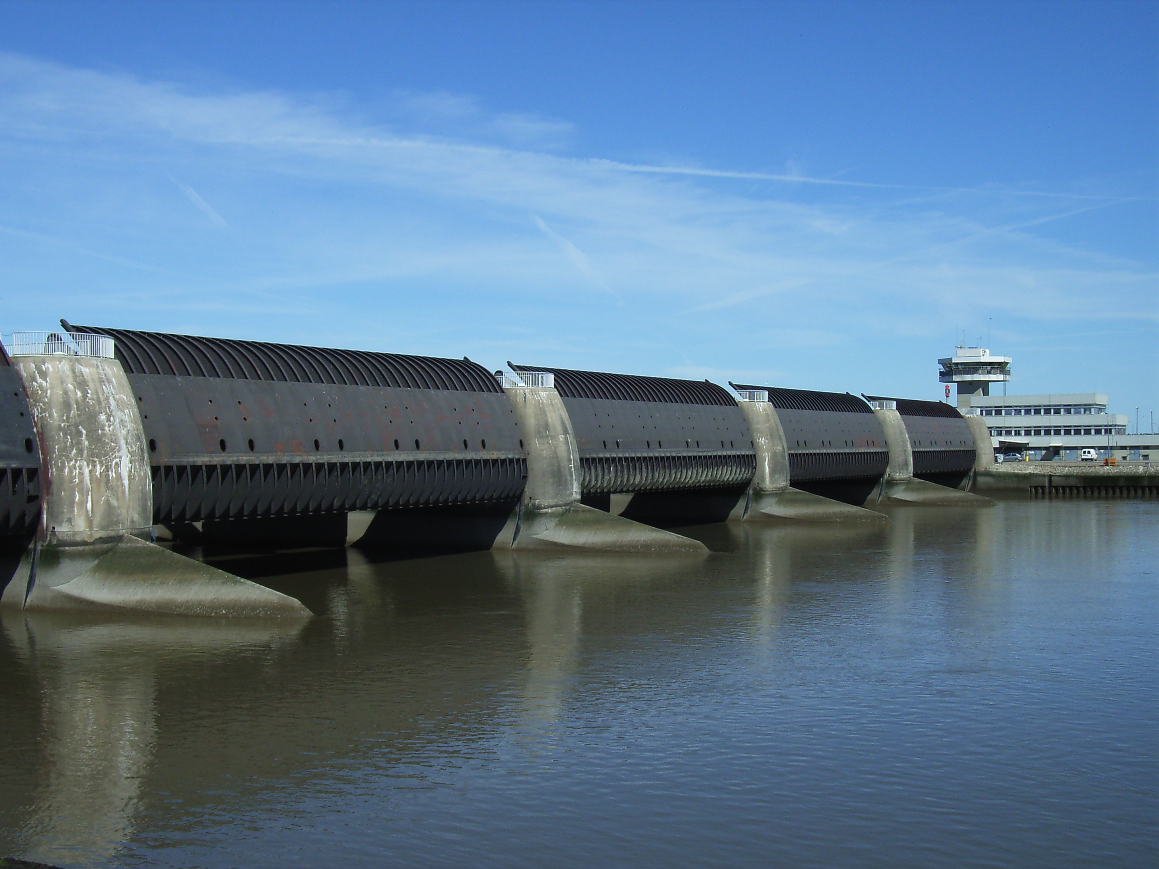 Eidersperrwerk